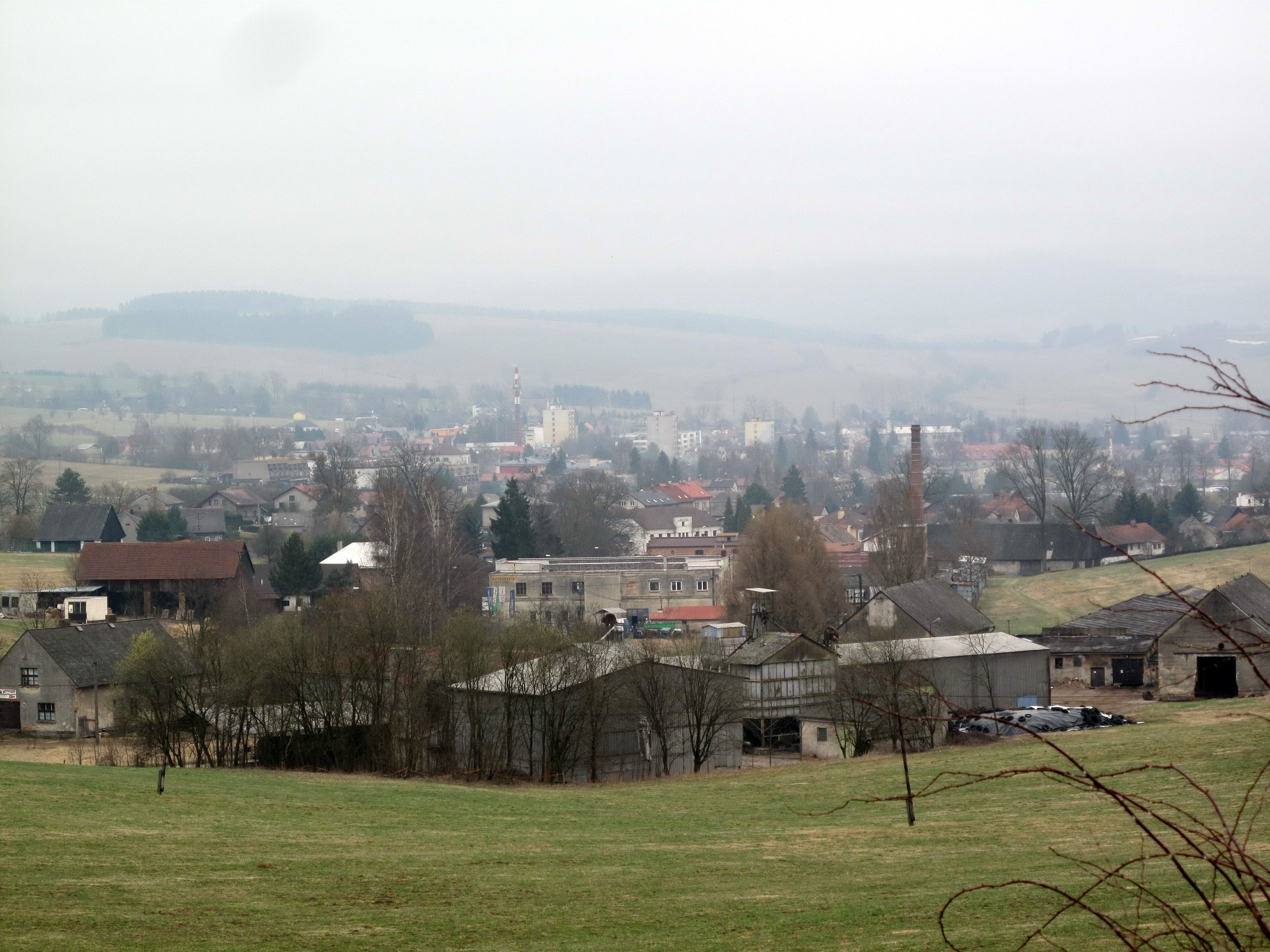 Výhled z oblasti pod osadou Ostaš